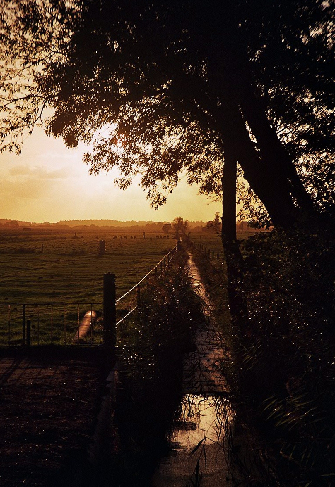 Landschaft bei Schlichting, abendlicher Blick in die Niederung direkt vom Ortszentrum aus